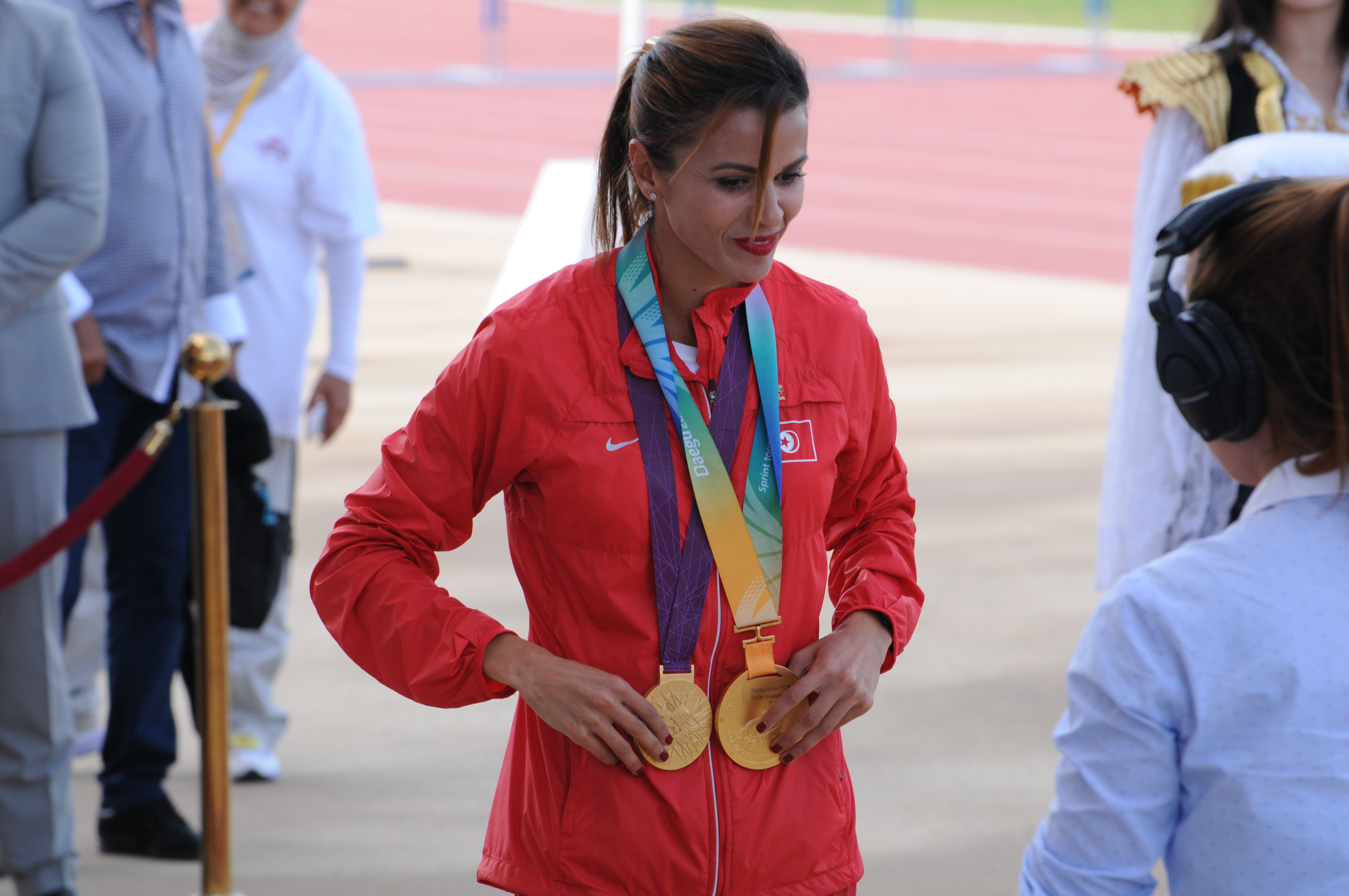 Habiba Ghribi lors de la cérémonie de remise de la médaille d'or des JO 2012